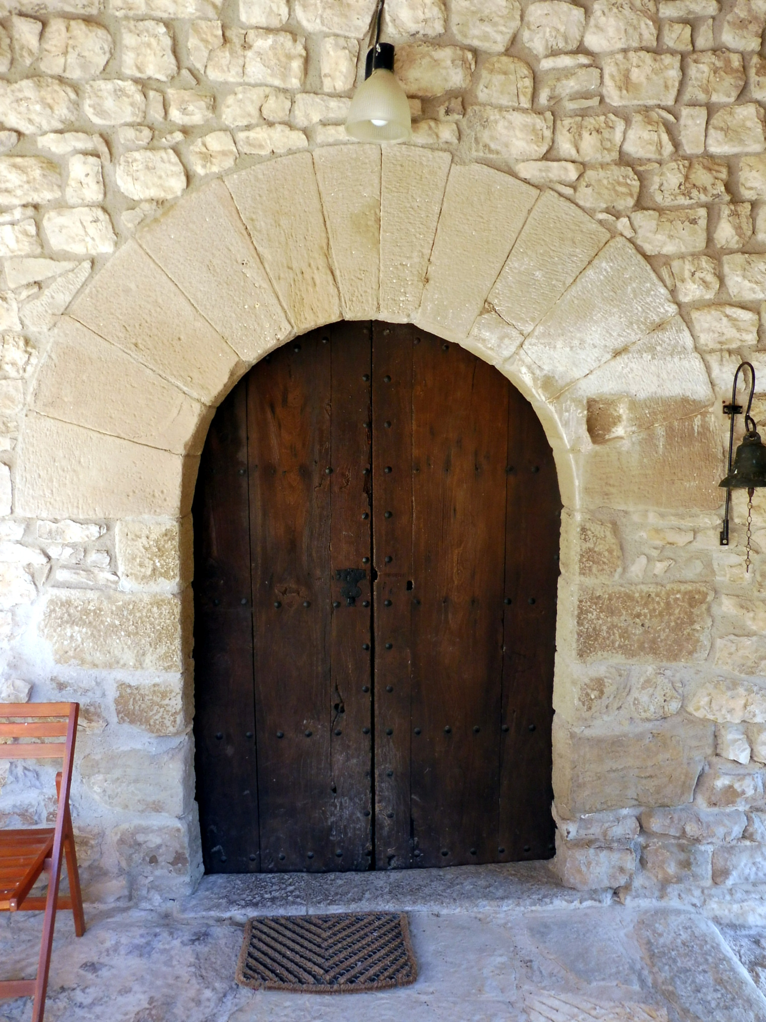 El Mas (Sant Mateu de Bages): portal sota el porxo